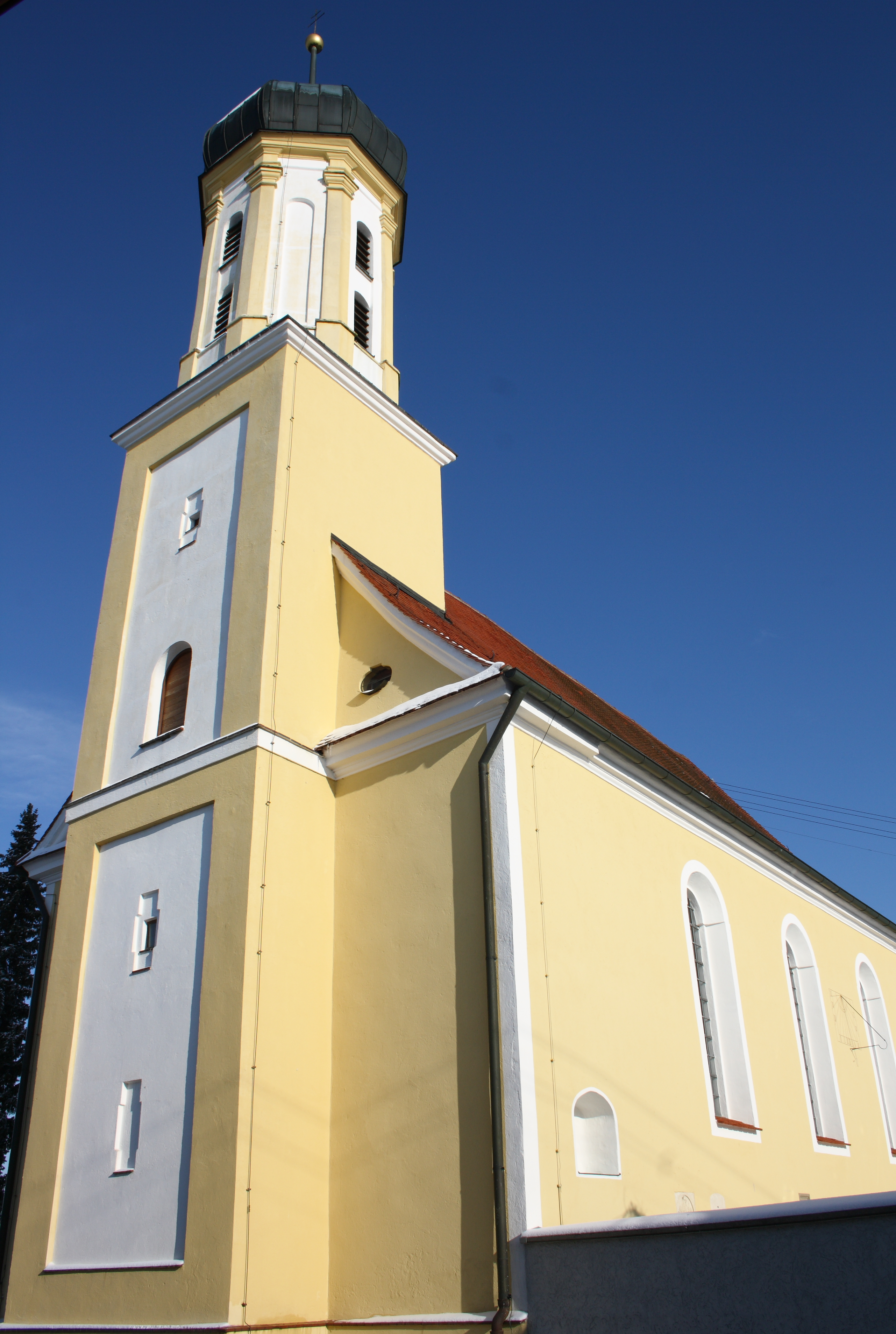 Katholische Pfarrkirche St. Peter in Burghagel, einem Ortsteil der Gemeinde Bachhagel im Landkreis Dillingen an der Donau (Bayern), Kirchturm an der Westwand